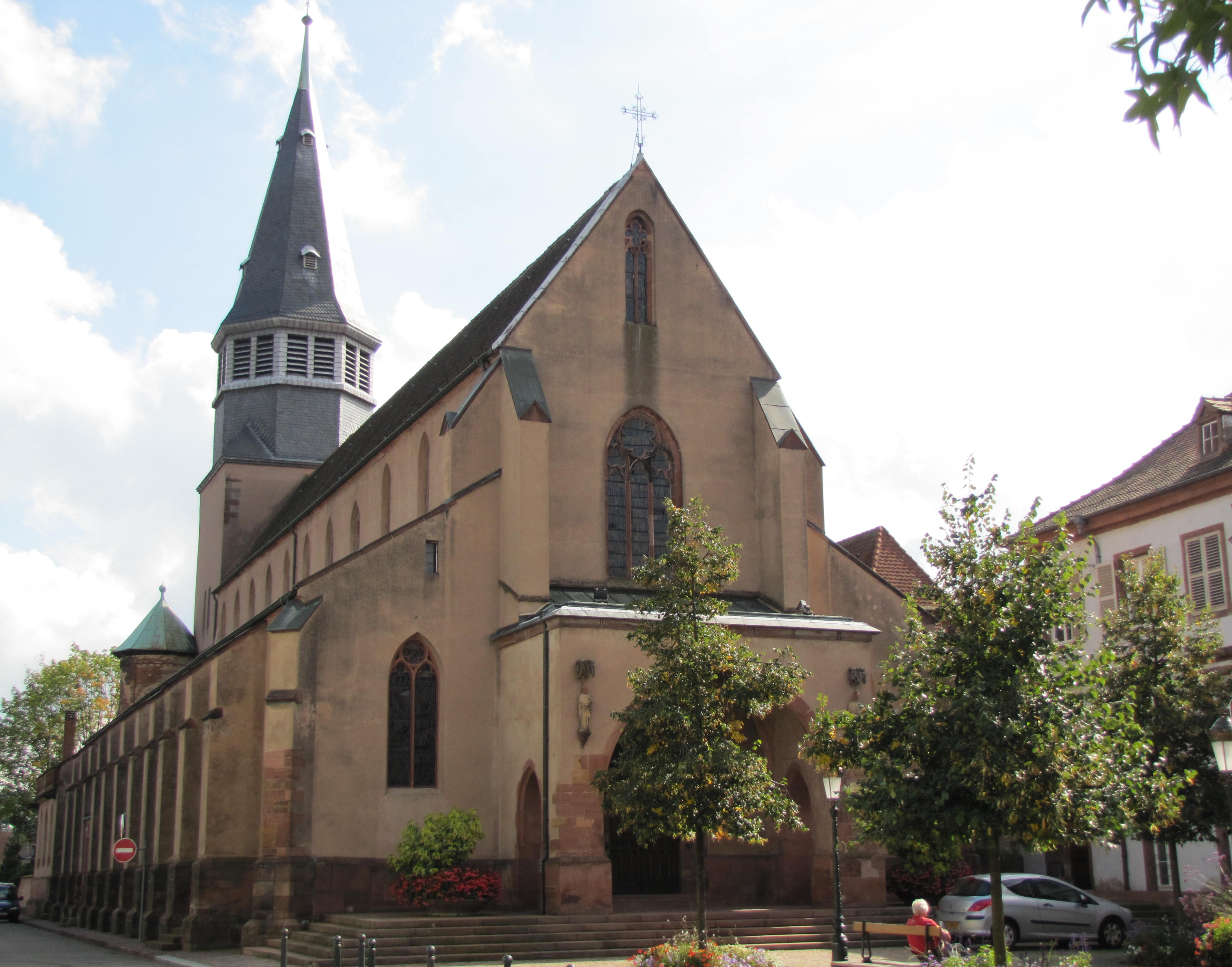 Alsace, Bas-Rhin, Église Saint-Nicolas de Haguenau, (Ancienne église du Couvent des Prémontrés) (PA00084725, IA00061903).